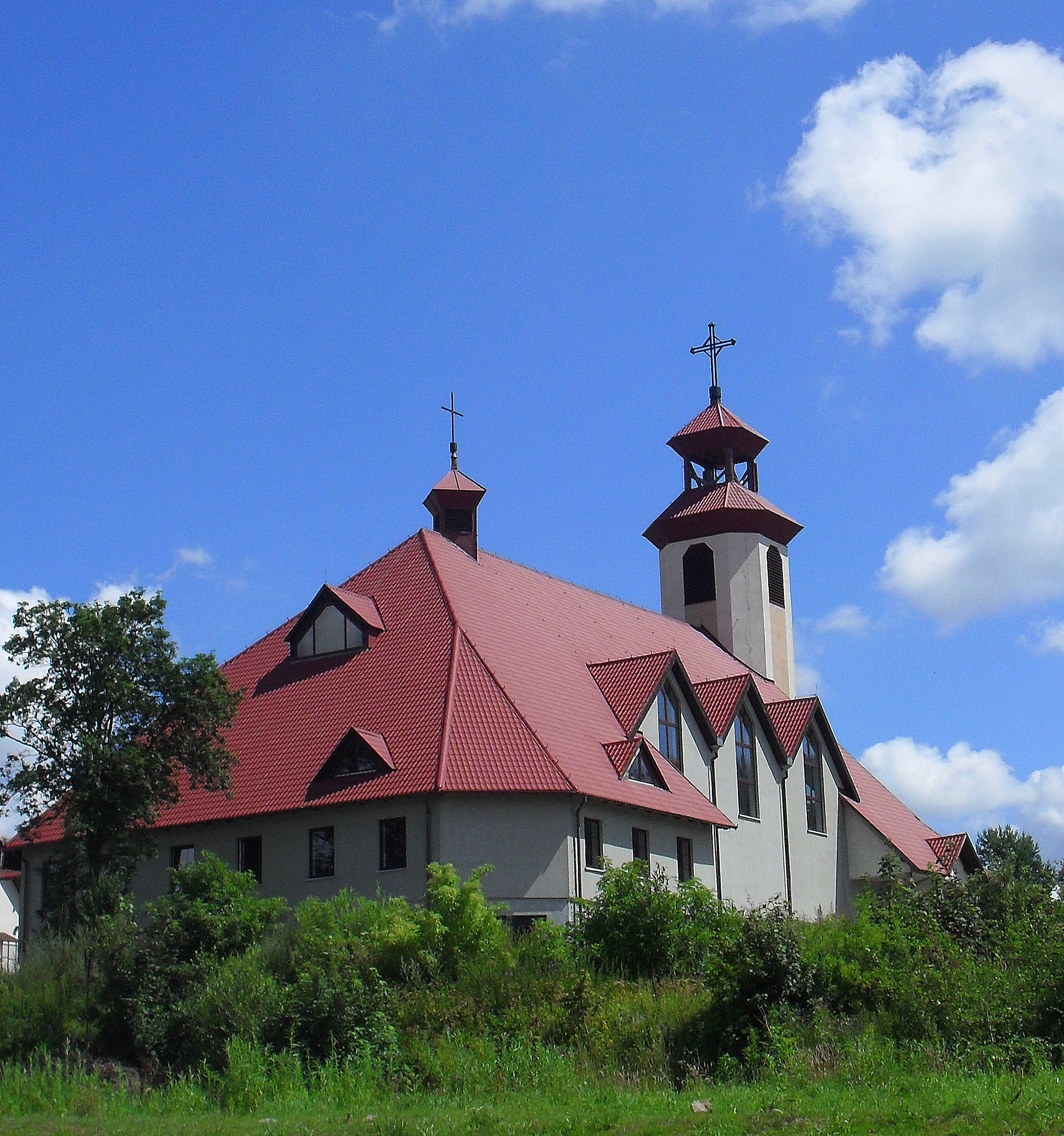 Kościół pw. Najświętszego Serca Pana Jezusa w Kamiennej Górze